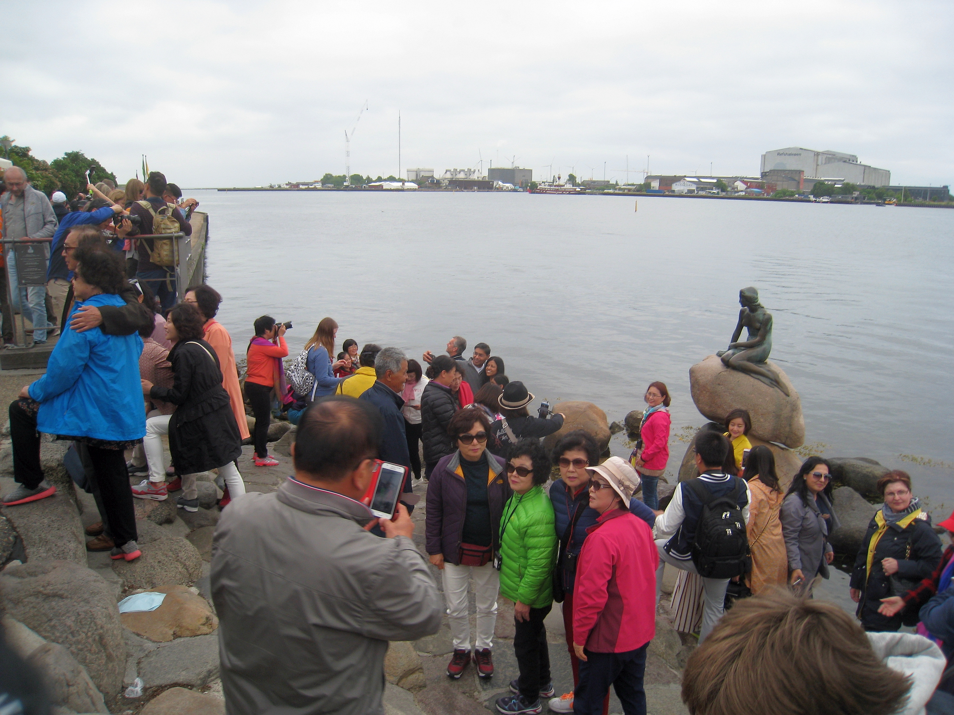 Kleine Meerjungfrau in Kopenhagen